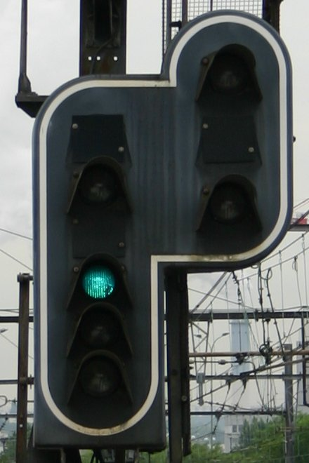 Signal SNCF voie libre : vert. Ne commande aucune action, marche normale.